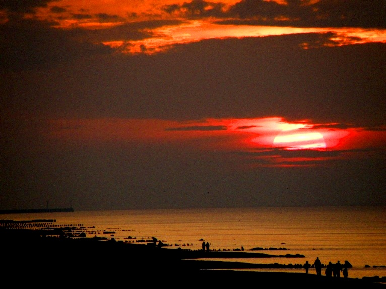 zachód słońca w Dziwnówku po sezonie